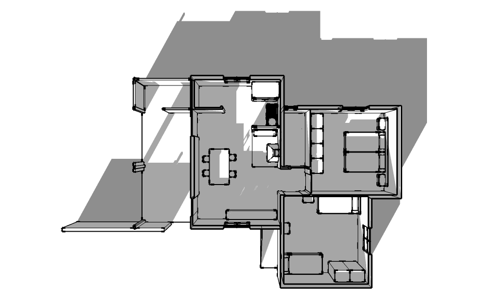 Veduta dall'alto della Casa rurale, progettata e realizzata dagli architetti Piero De Amicis e Vincenzo Manente, collocata nel Parco realizzata per la X edizione della Triennale di Milano